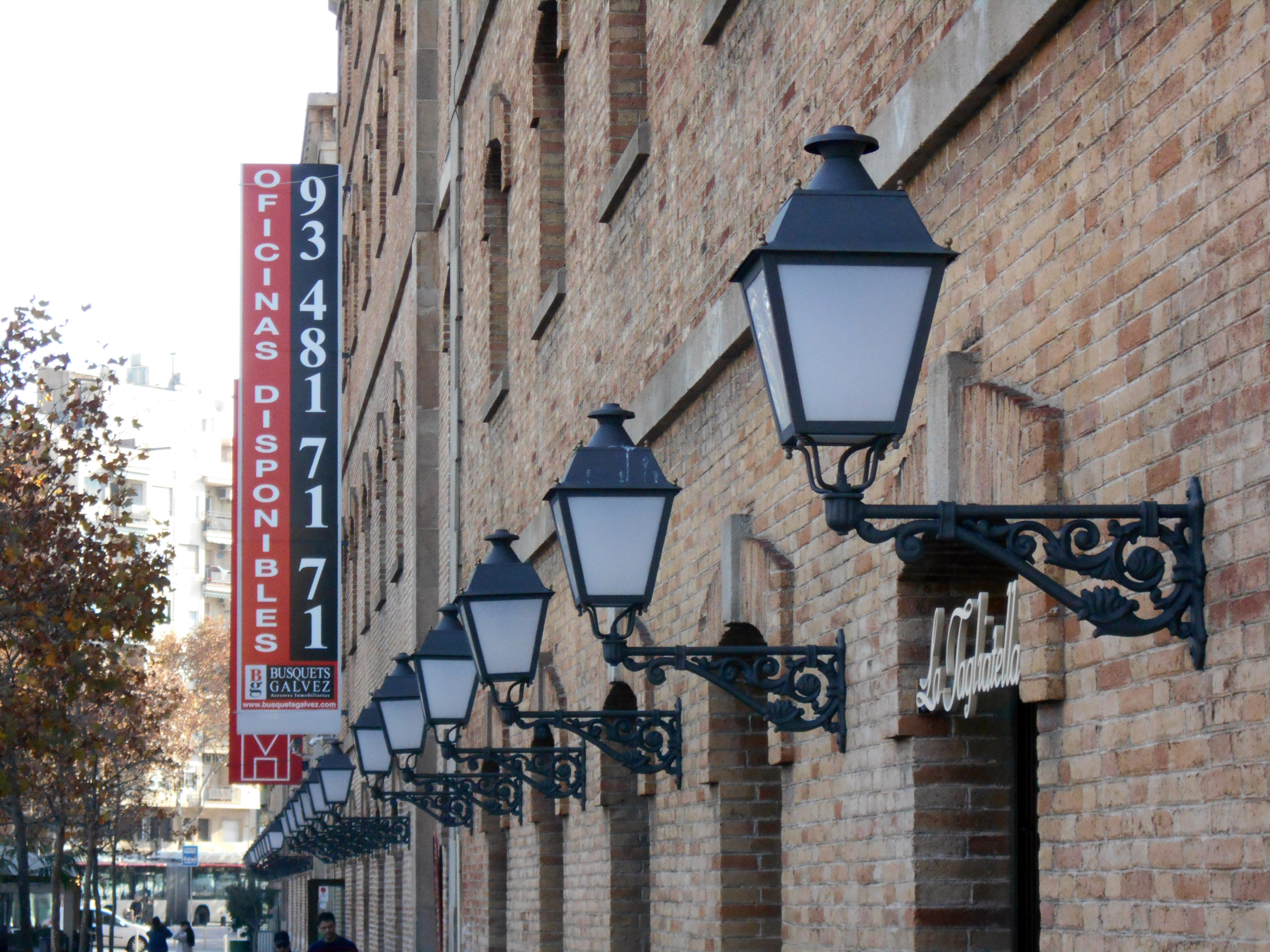 Faroles tipo Montmartre, plaza de Pau Vila, Barcelona.